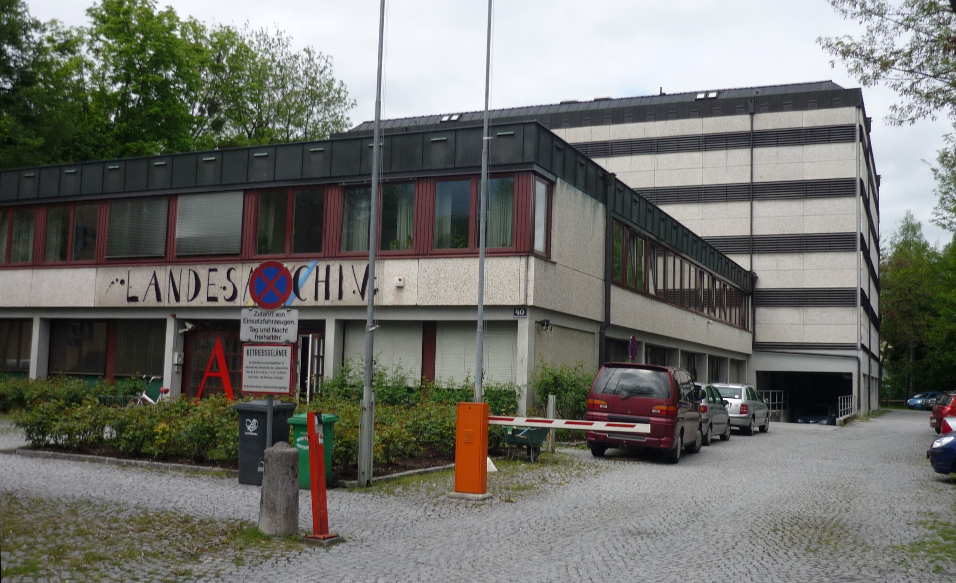 Salzburger Salzburger Landesarchiv, die Aufschrift Landesarchiv wurde ca. 2014 entfernt